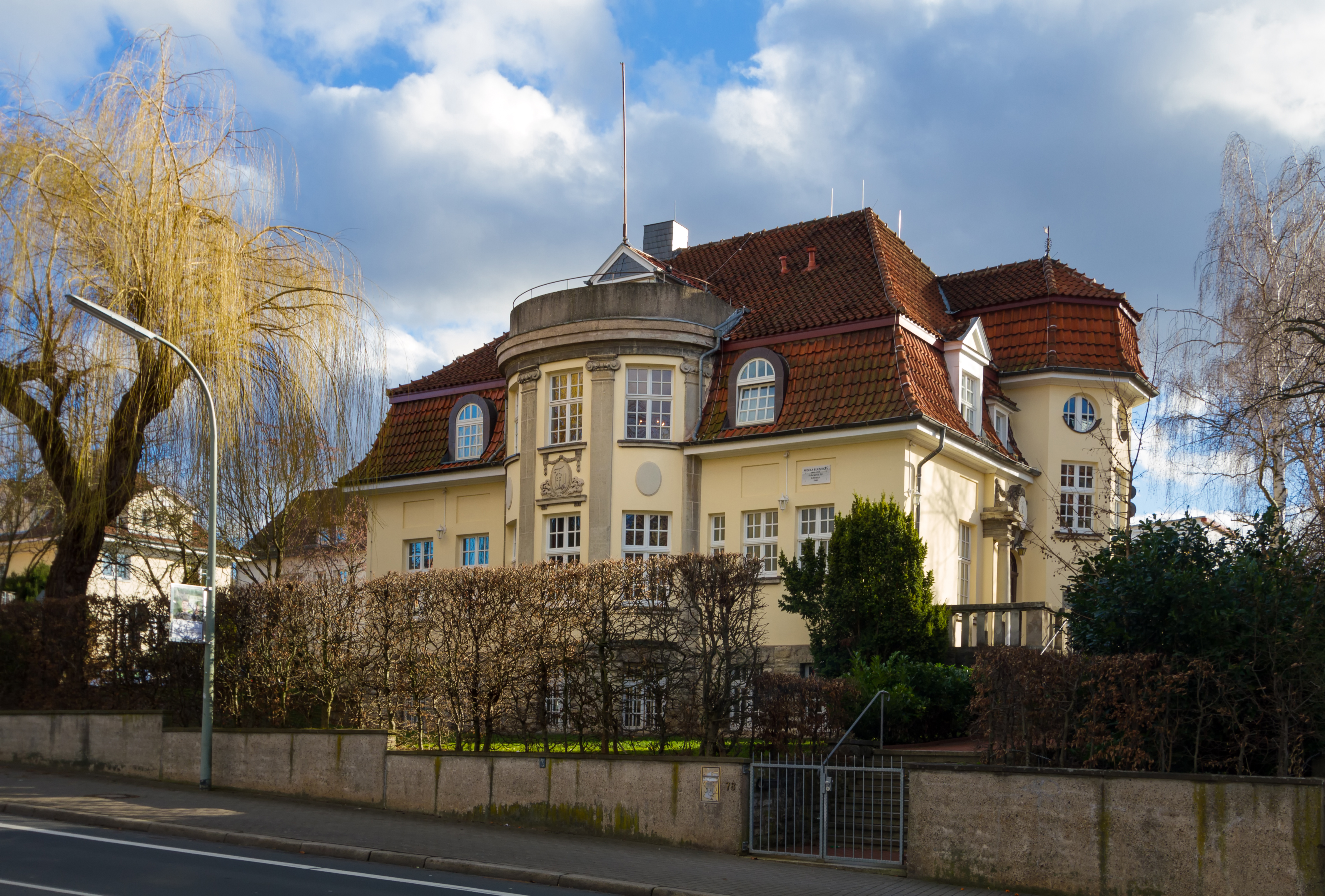 Haus des Göttinger Corps Frisia, Nikolausberger Weg 78, im Februar 2014.